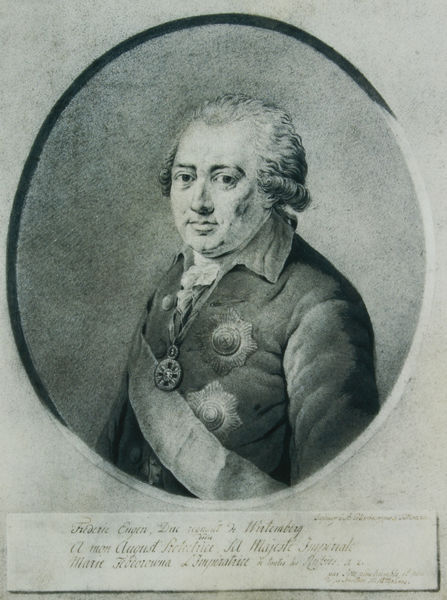 Titel Porträt des Herzogs Friedrich Eugen von Württemberg Ort St. Petersburg / Schloss Pawlowsk Datierung 1796/1801